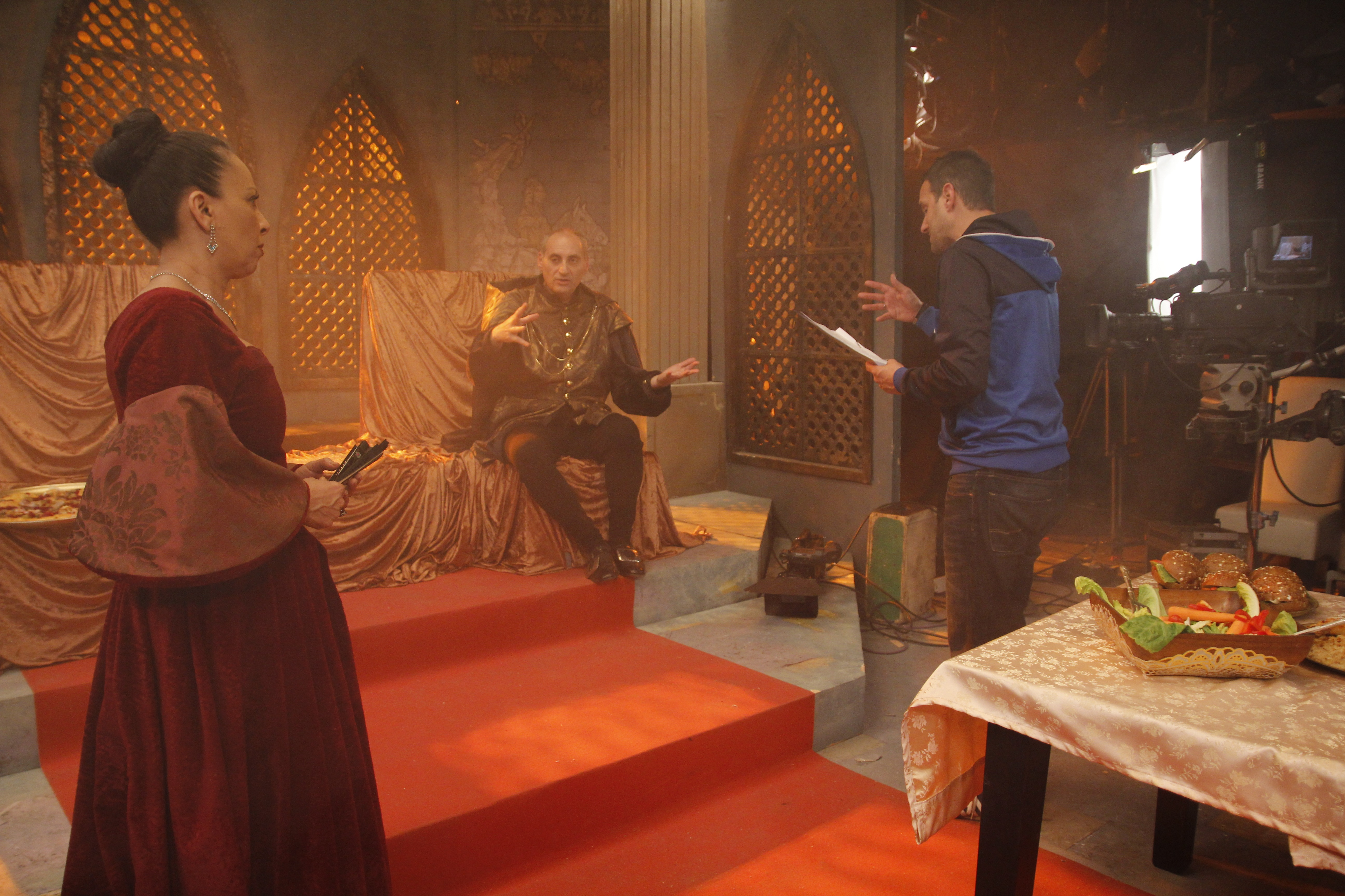 תמונה מתוך הסט של סדרת הטלוויזיה גאליס